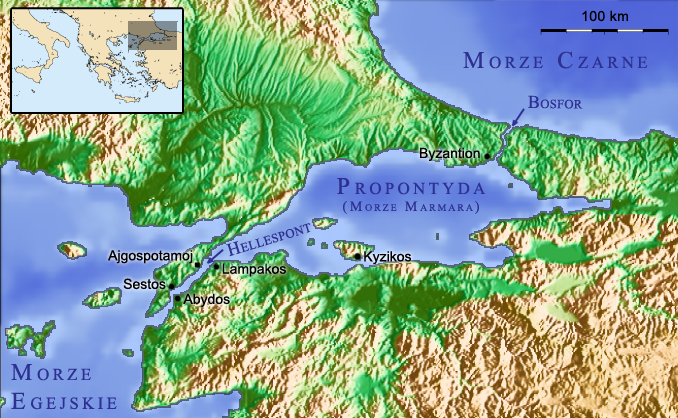 Mapa okolic Hellespontu V wiek p.n.e. Kyzikos leżało na wyspie, która obecnie jest półwyspem. Topografia na podstawie danych: GLOBE ETOPO2